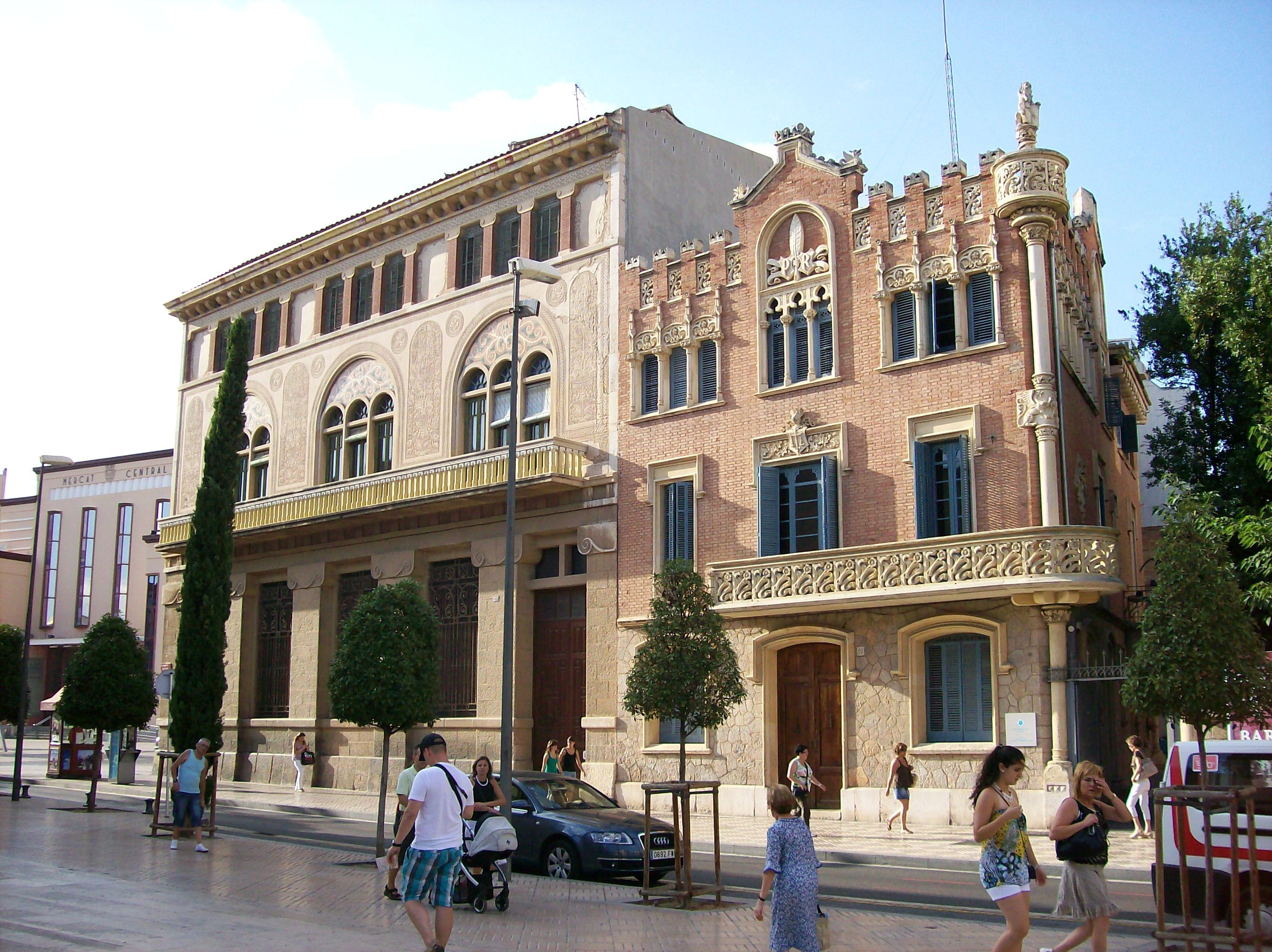 Реус. Дом Гасуль (1912) и Дом Руль (1901). Архитектор Луис Доменек и Монтанер. Улица Сан Хуана, 27.